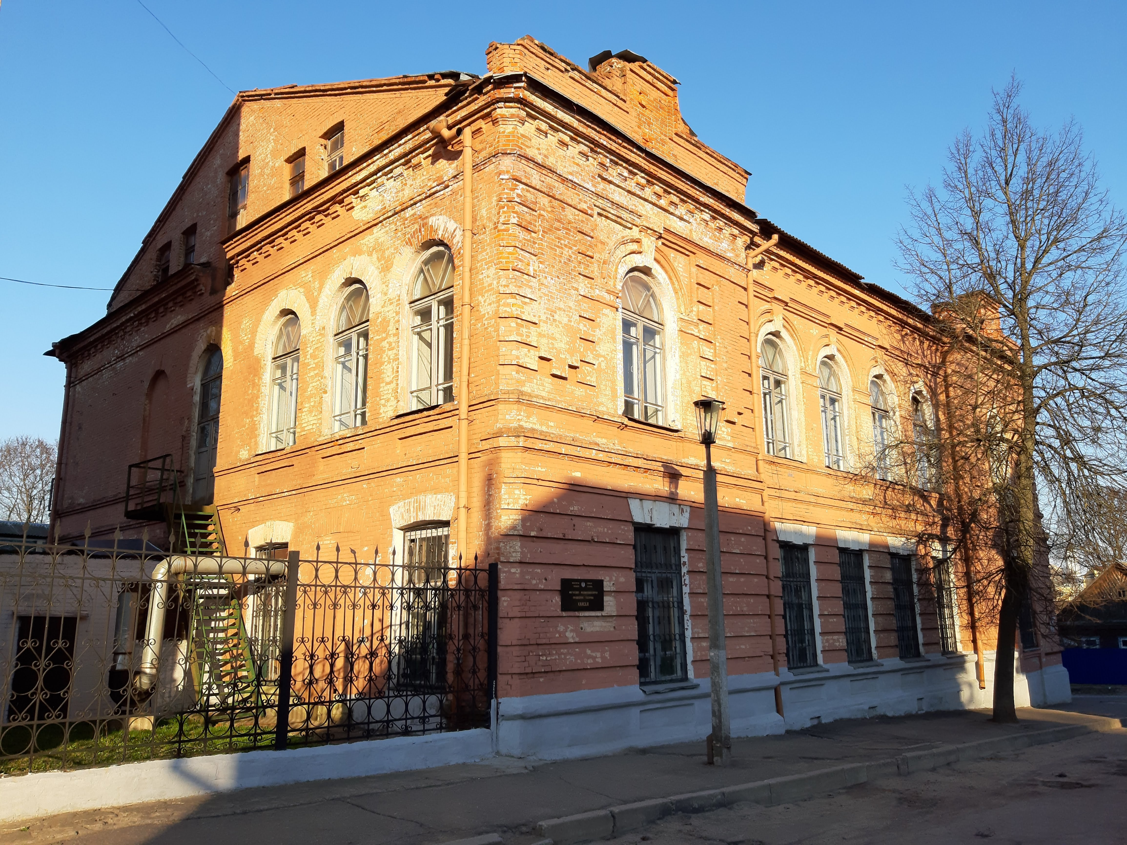 Магілёў. Вуліца Пляханава